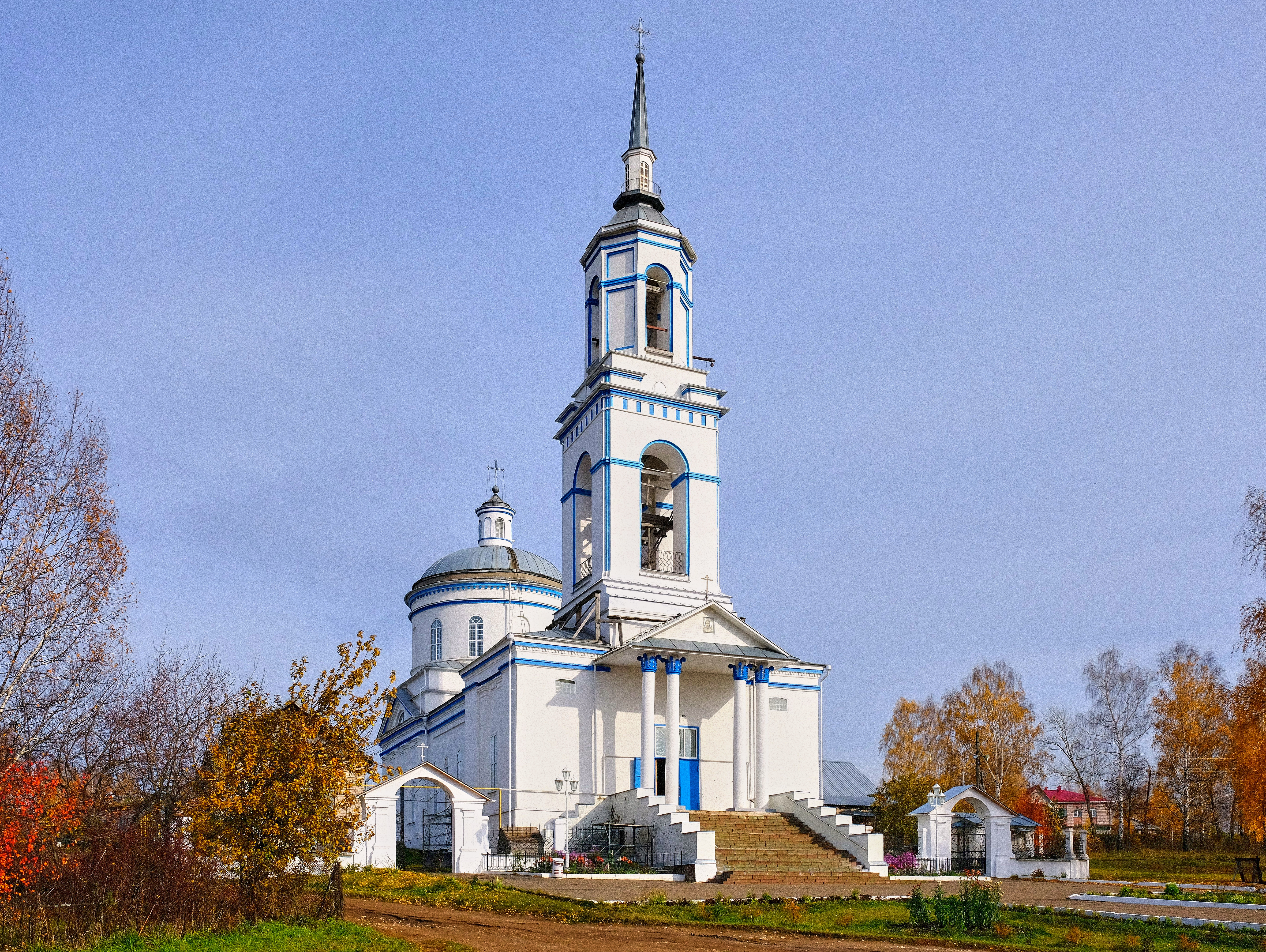 Казанско-Богородицкая церковь в селе Можга (Можгинский район Удмуртии)